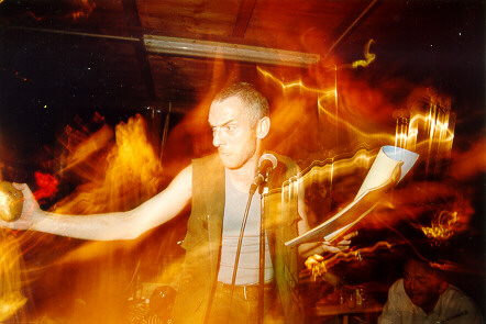 Michael Stein (als Käptn Ahab) in einem Live-Hörspiel von Robert Weber (Käptn Ahabs Flaschenpost im Verein der Visionäre 1998)